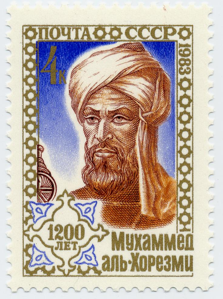 Sonderbriefmarke zu 4 Kopeken der ehemaligen Sowjetunion vom 6. September 1989 zum 1200sten Geburtstag von Abu Abdullah Muhammad bin Musa al-Khwarizmi (persisch: أبو عبد الله محمد بن موسى خوارزمي ).